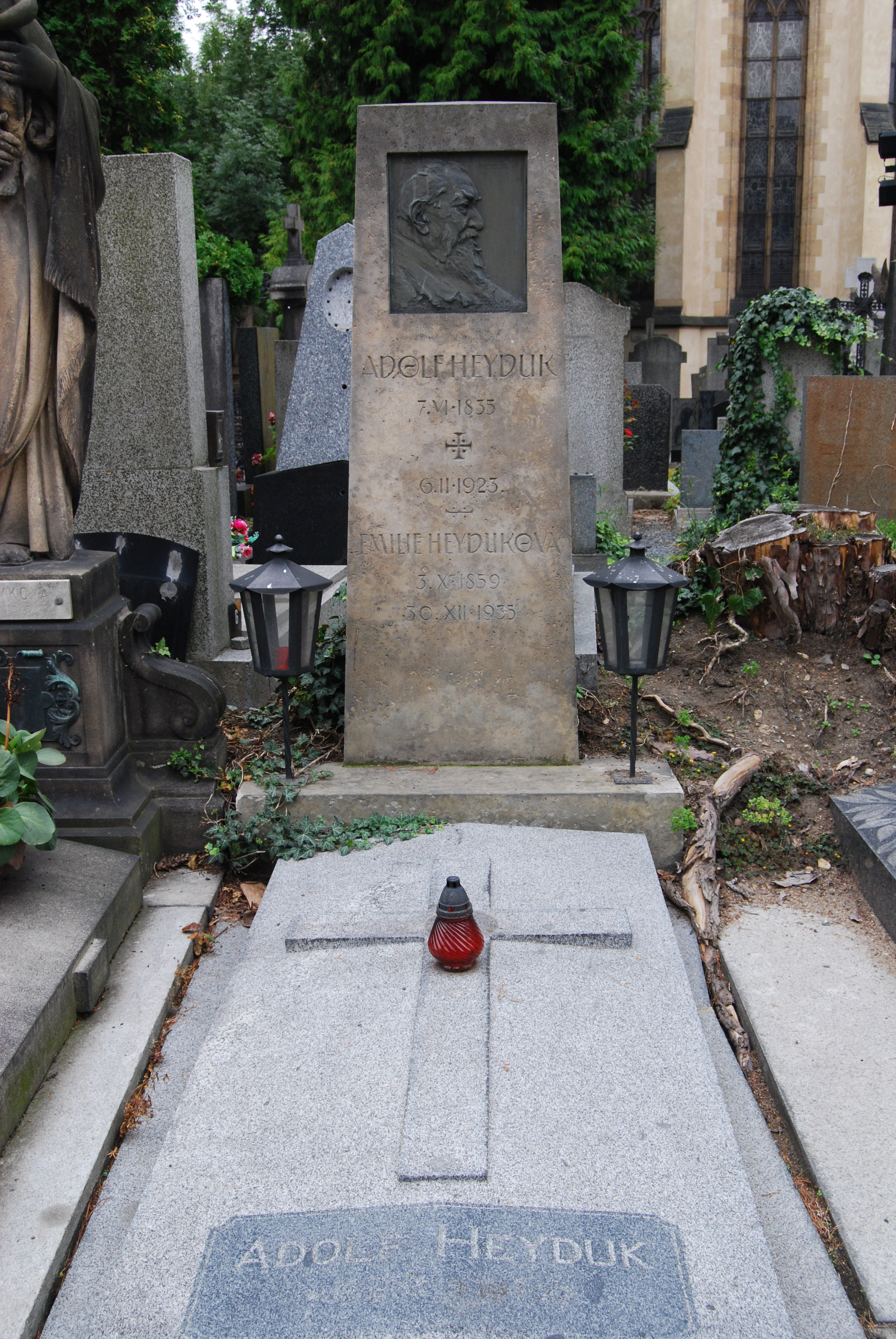 Jednotlivé náhrobky. Slavín (hrobka). Adolf Heyduk. Vyšehradský hřbitov. Praha. Česká republika